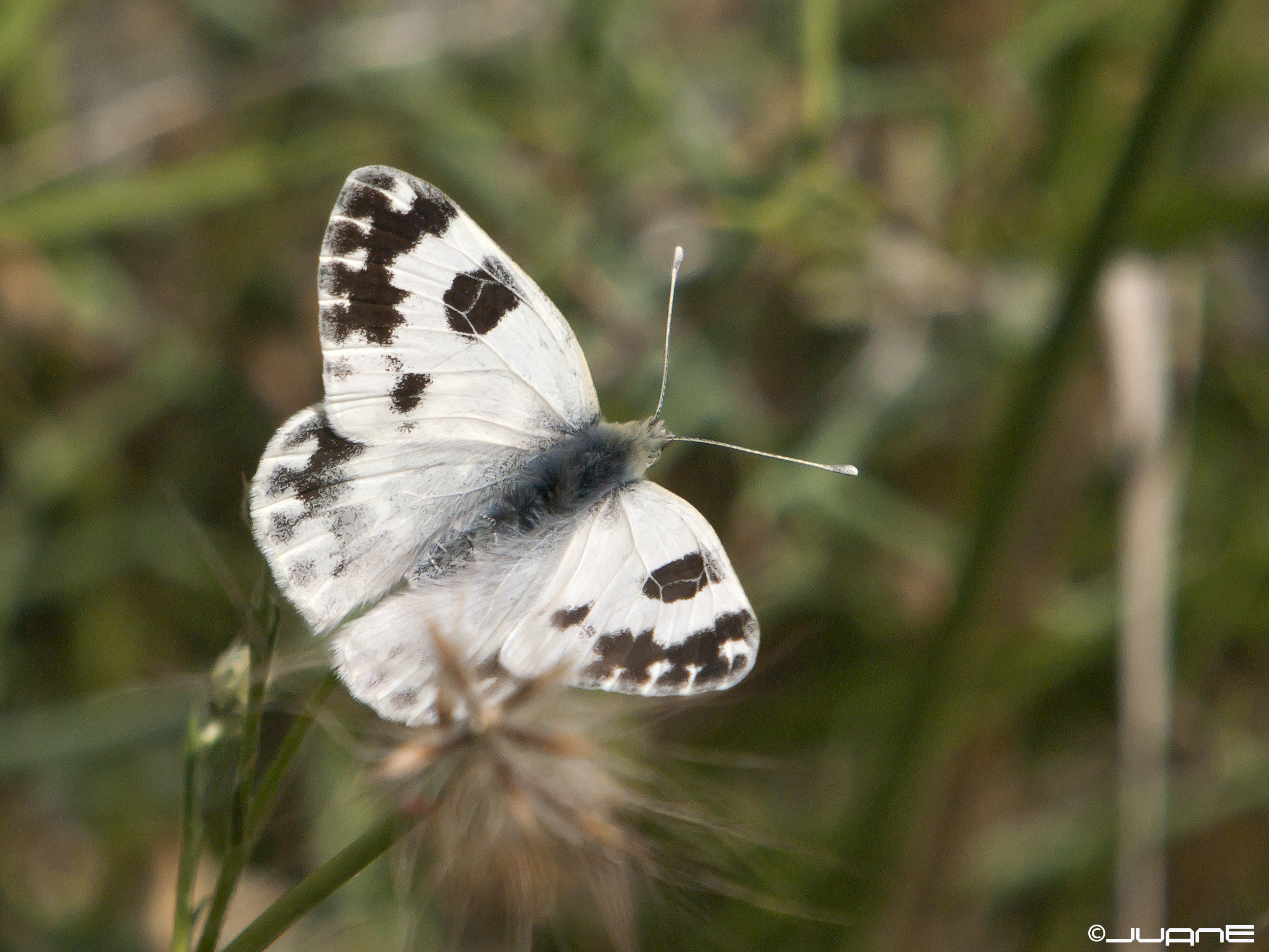 Pontia daplidice